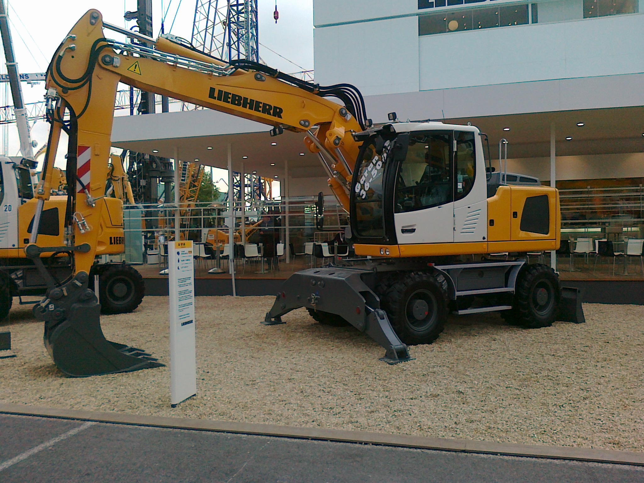 Pelle à pneus Liebherr A916 compacte au salon Intermat 2012